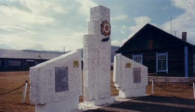 Памятник в Нурте